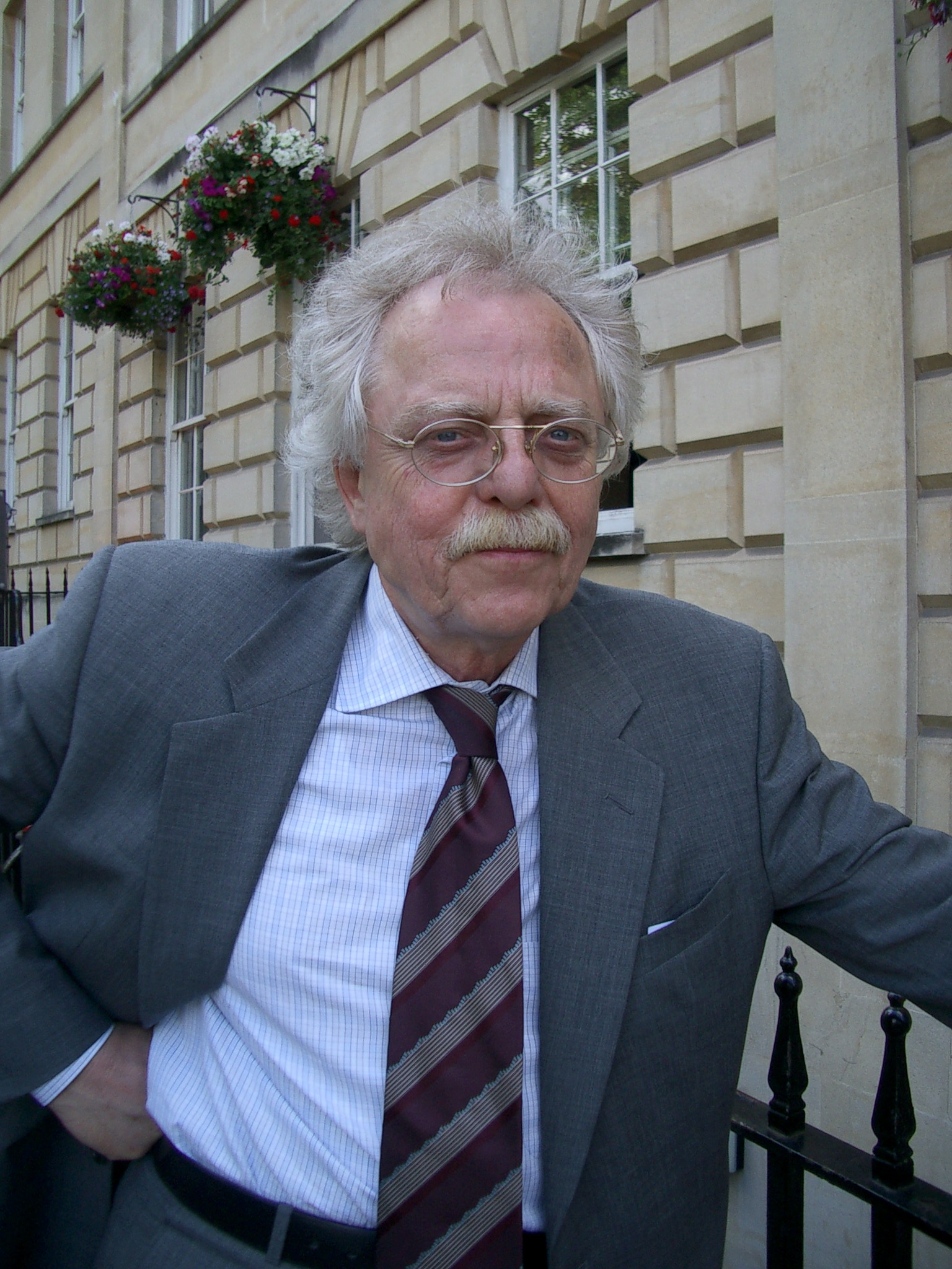 Prof. Dr. Rolf Schulmeister